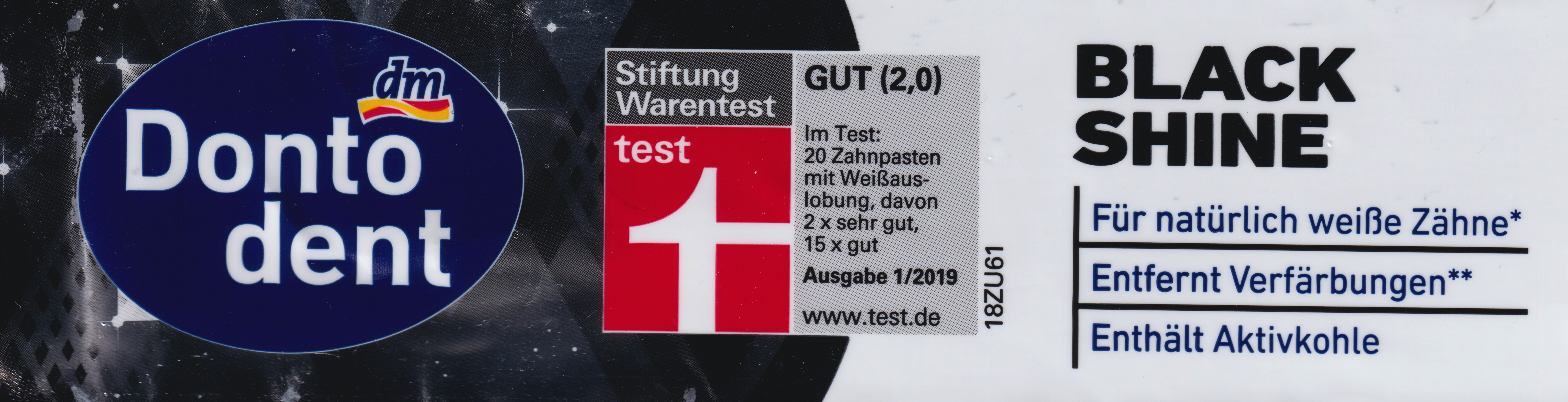 Vorderseite einer Zahnpastatube. Die Zahnpaste ist SCHWARZ(!) und enthält Aktivkohle zur Entférnung von Verfärbungen der Zähne.